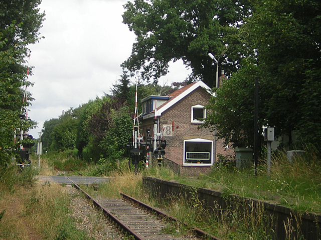 Station Driehuis-Westerveld, nadat er al 7 jaar geen trein meer over het traject gereden heeft.